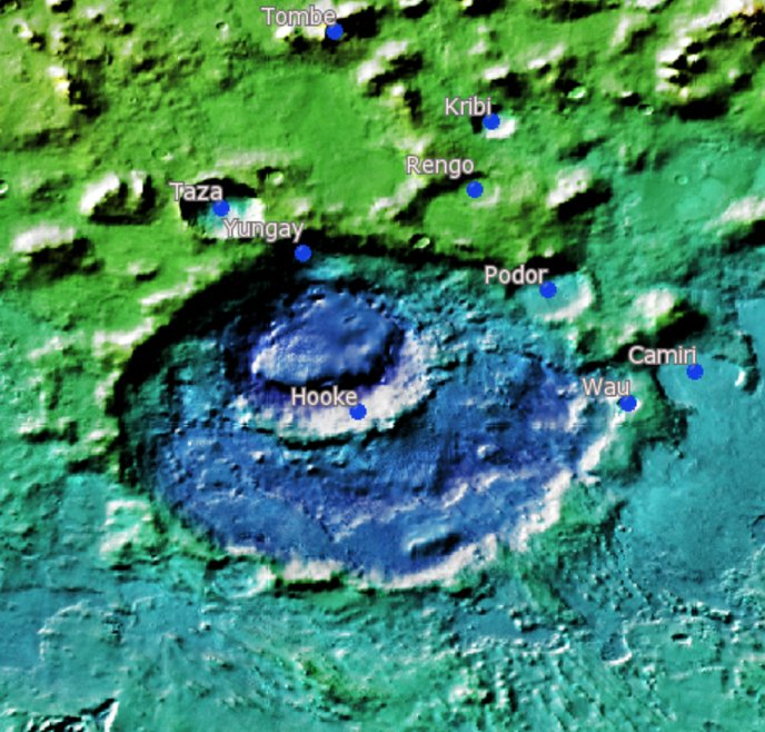 Cráter marciano Hooke.(Imagen IAU/USGS/Goddard/A SU/USGS)